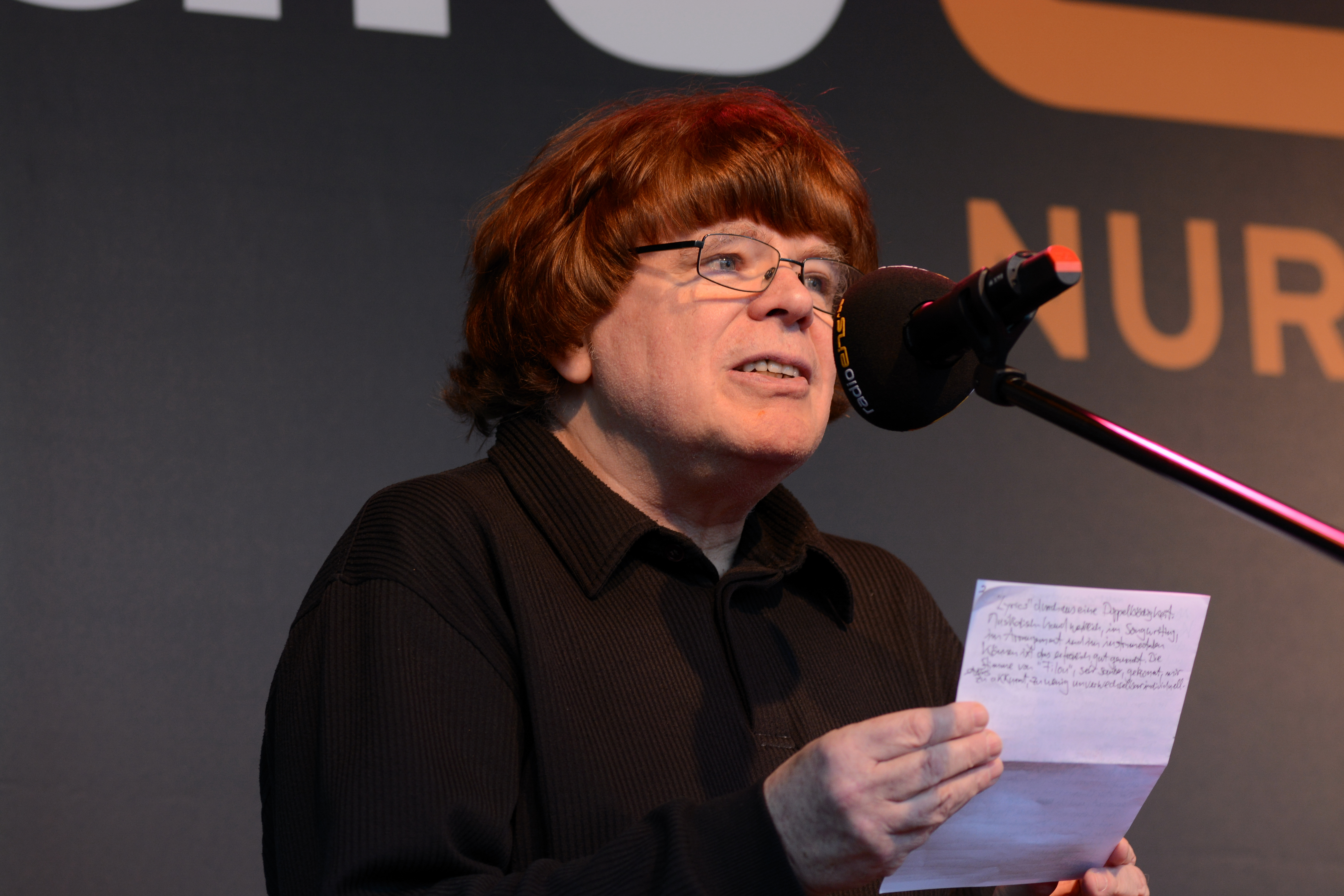 Prof. Hartmut Fladt beim Radio Eins Parkfest (2013)